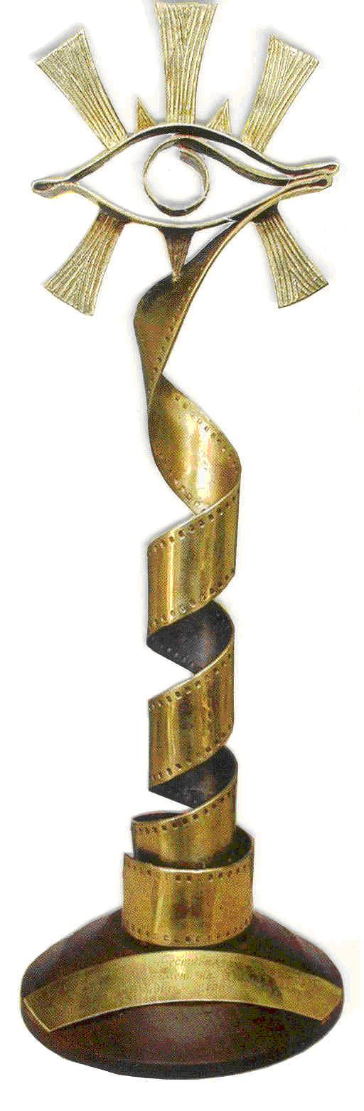 Наградата - статуетката "Златното око" на скулптора Димитър Бакърджиев от град Карлово